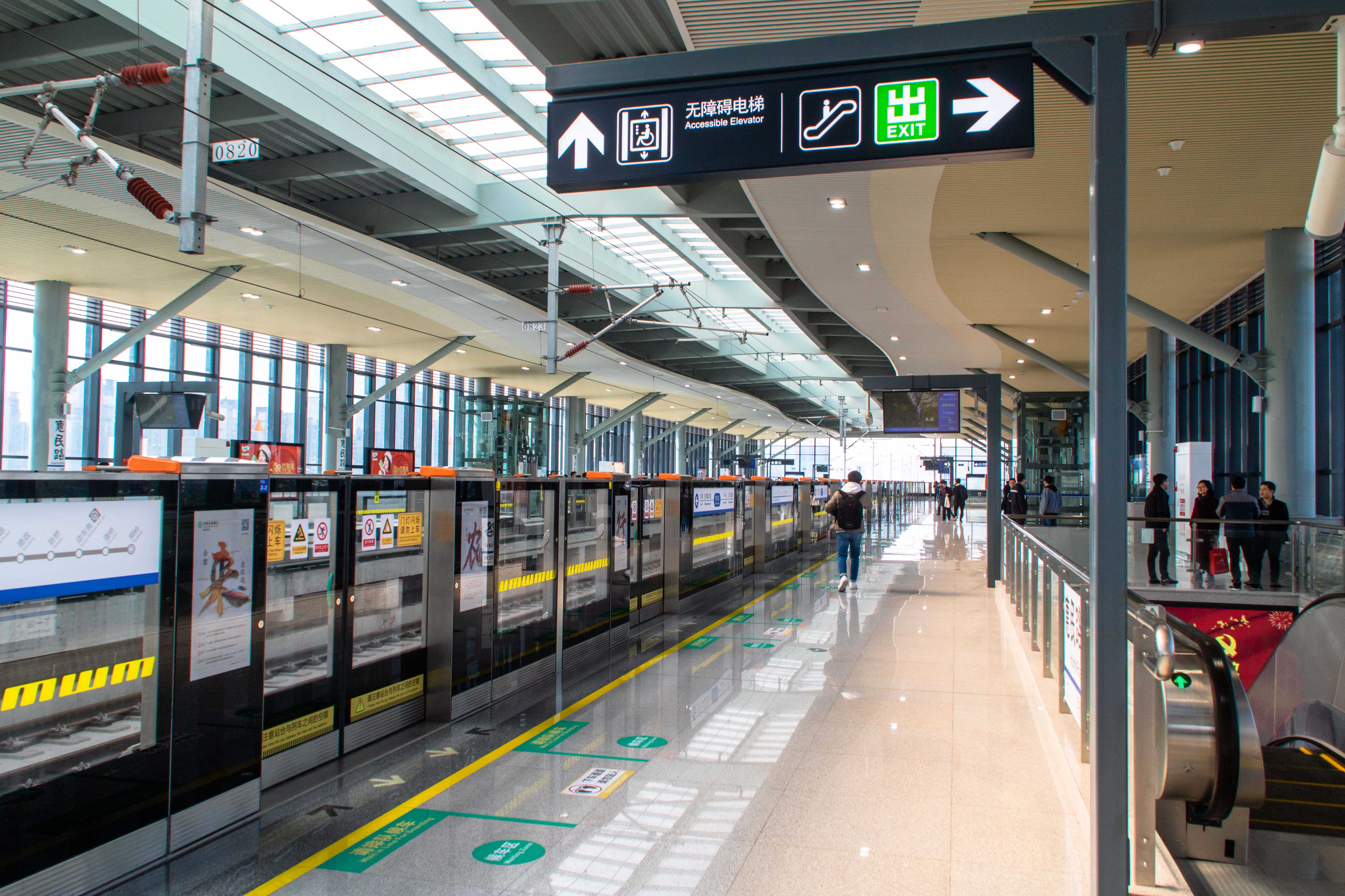 中文（中国大陆）: 惠民路站站台